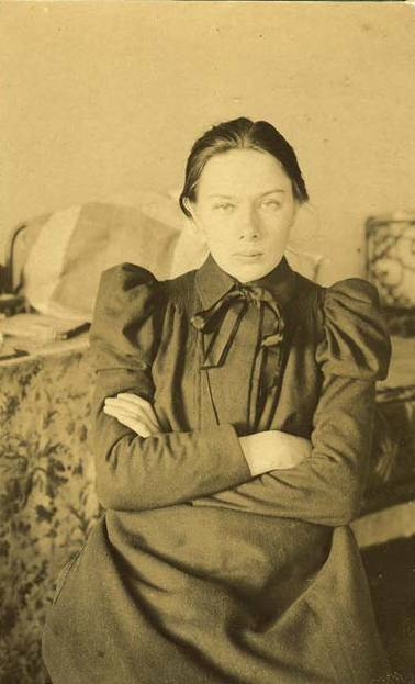 Nadezhda Krupskaya (1869-1939)